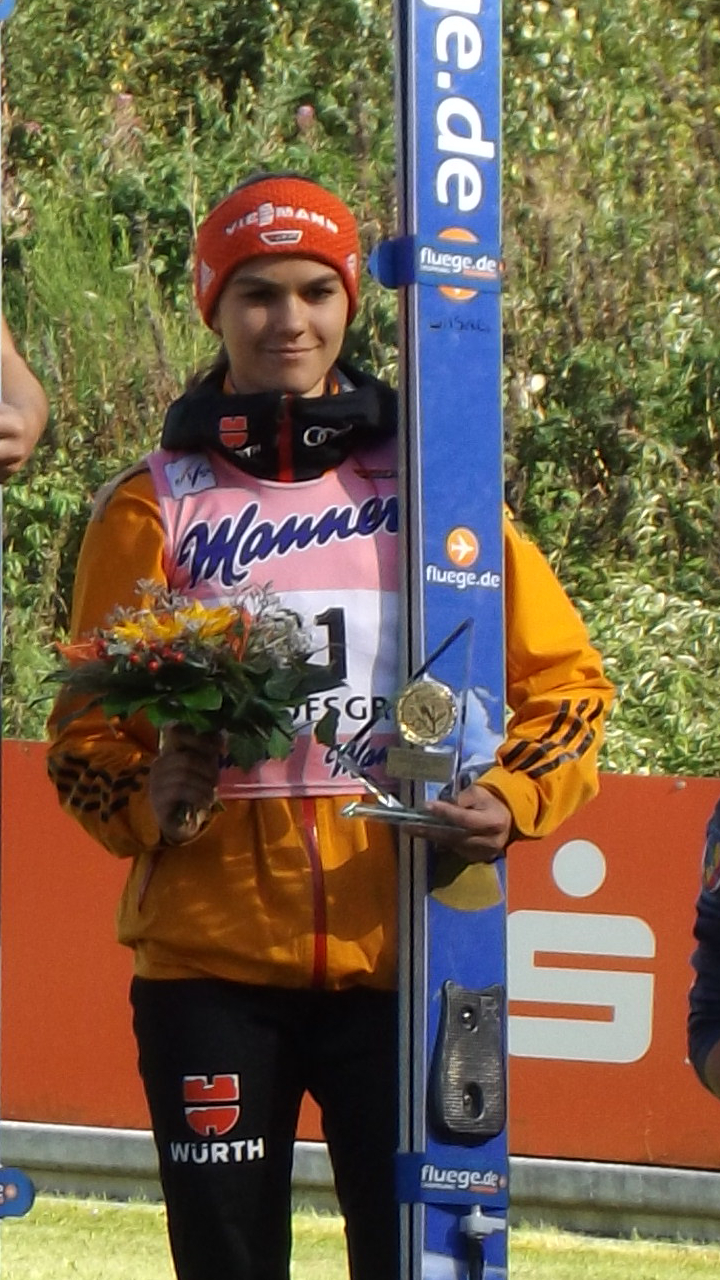 Skispringerin Luisa Görlich beim Alpencup in Bischofsgrün